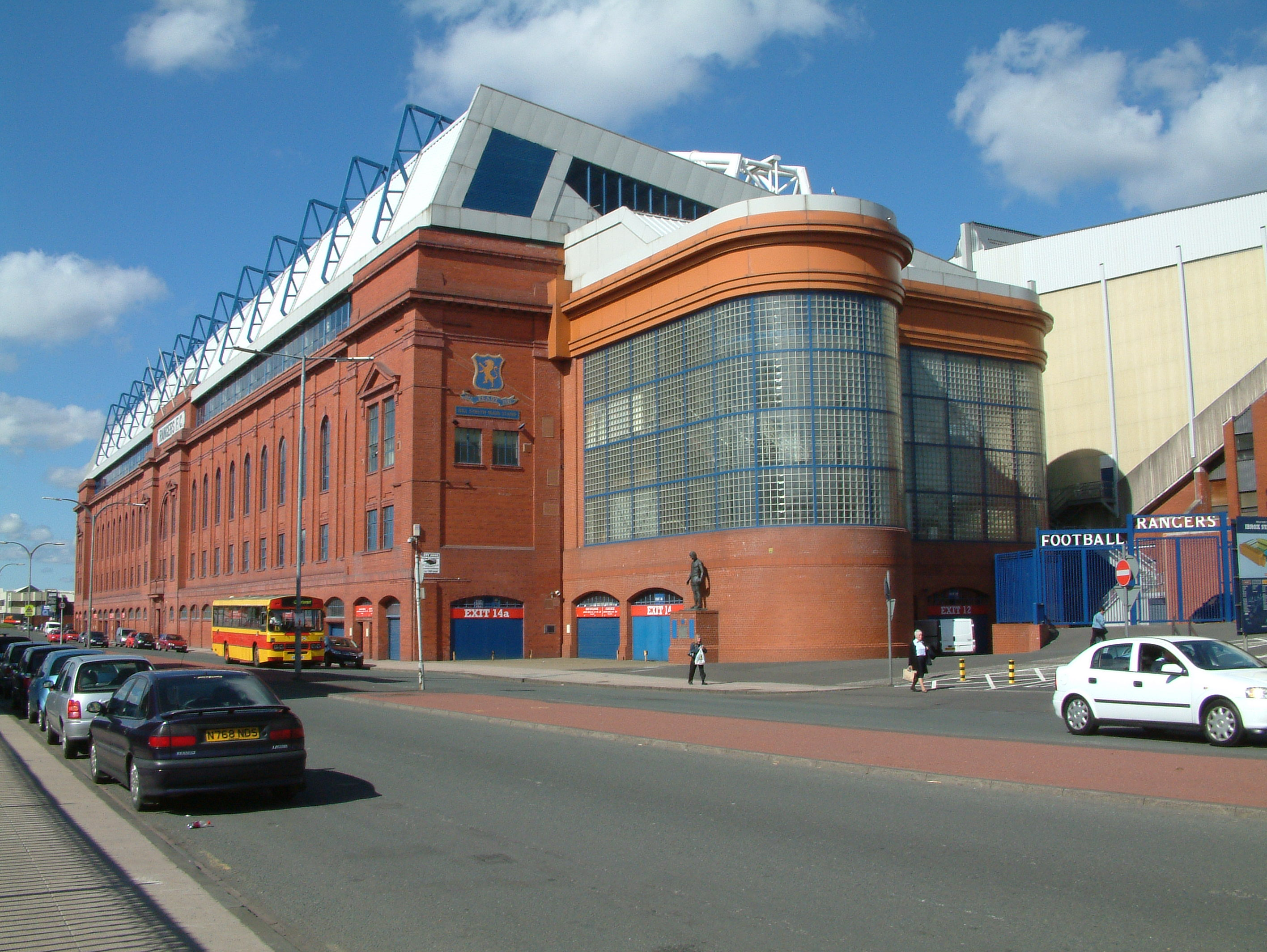 vlastni foto 9/2006